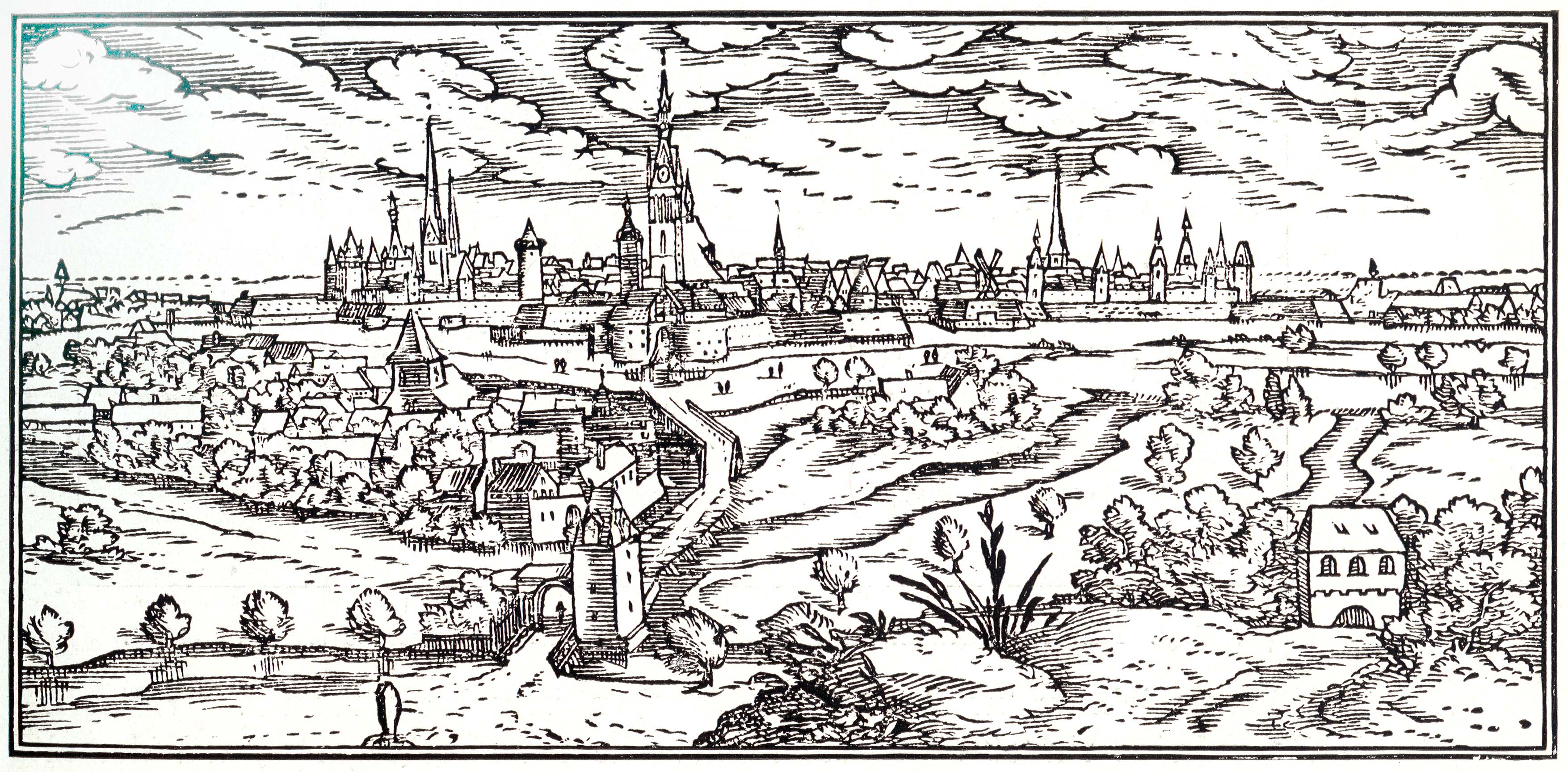 Holzschnitt von Elias Holwein aus dem Jahr 1636 mit einer Ansicht der Stadt Hannover, die der Urheber laut dem Denkmalpfleger Arnold Nöldeke „[...] von der Gegend der Ihmebrücke aus“ dargestellt hat. Literatur: Arnold Nöldeke: Befestigung, in derselbe: Die Kunstdenkmale der Stadt Hannover, Bd. 1, Heft 2, Teil 1: Denkmäler des "alten" Stadtgebietes Hannover, Hannover: Selbstverlag der Provinzialverwaltung, Schulzes Buchhandlung, 1932, S. 42–74; hier: S. 45 (Neudruck im Verlag Wenner, Osnabrück 1979, ISBN 3-87898-151-1).